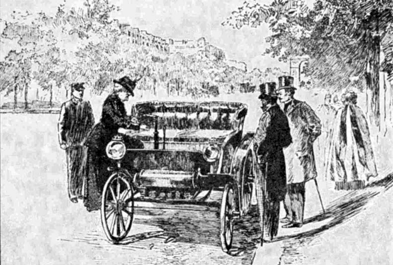 La duchesse d'Uzès se présente au "certificat de capacité", ancêtre du permis de conduire, le 12 mai 1898. - Première femme à obtenir le certificat de conduite.Gravure publiée dans La Vie au grand air du 15 mai 1898.